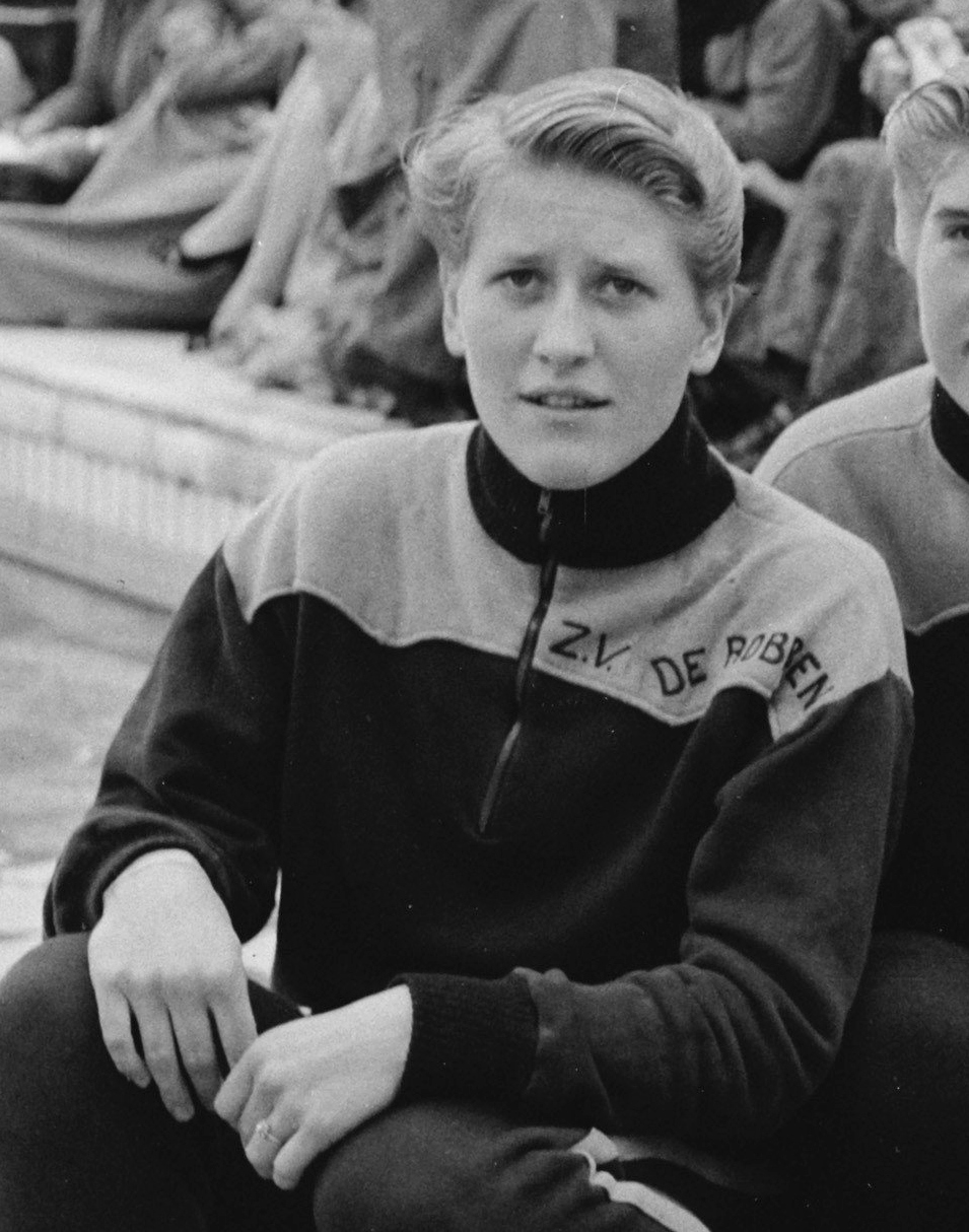 Collectie / Archief : Fotocollectie Anefo Reportage / Serie : [ onbekend ] Beschrijving : Nationale zwemkampioenschappen Amsterdam, start 100 mete rugslag dames. L. de Nijs Datum : 2 september 1956 Locatie : Amsterdam, Noord-Holland Trefwoorden : zwemkampioenschappen Persoonsnaam : A. Voorbij, G. Kraan, Nijs, L. de, R. Krom Fotograaf : Behrens, Herbert / Anefo Auteursrechthebbende : Nationaal Archief Materiaalsoort : Negatief (zwart/wit) Nummer archiefinventaris : bekijk toegang 2.24.01.03 Bestanddeelnummer : 907-9777